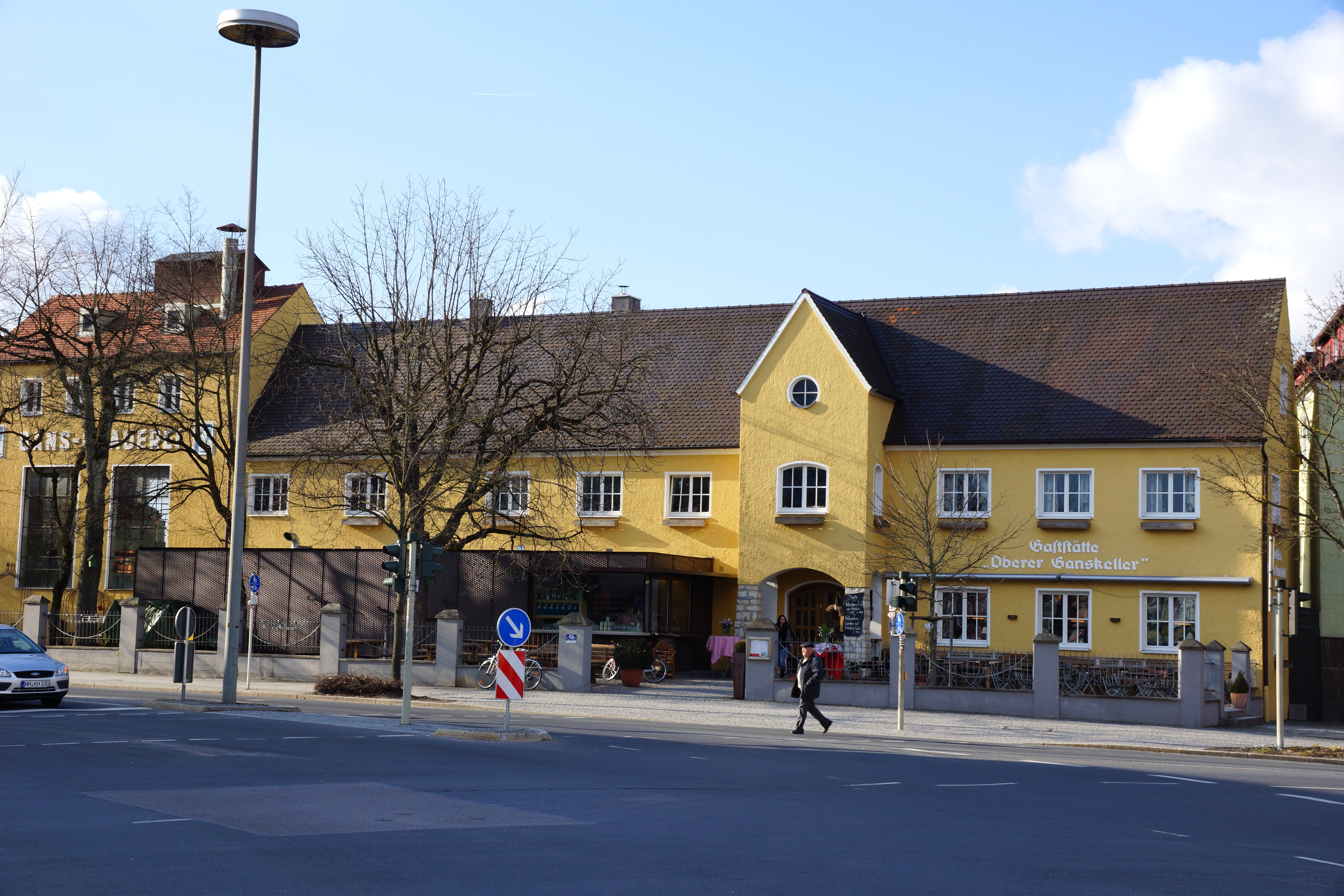 Die Neumarkter Gansbrauerei am Oberen Tor